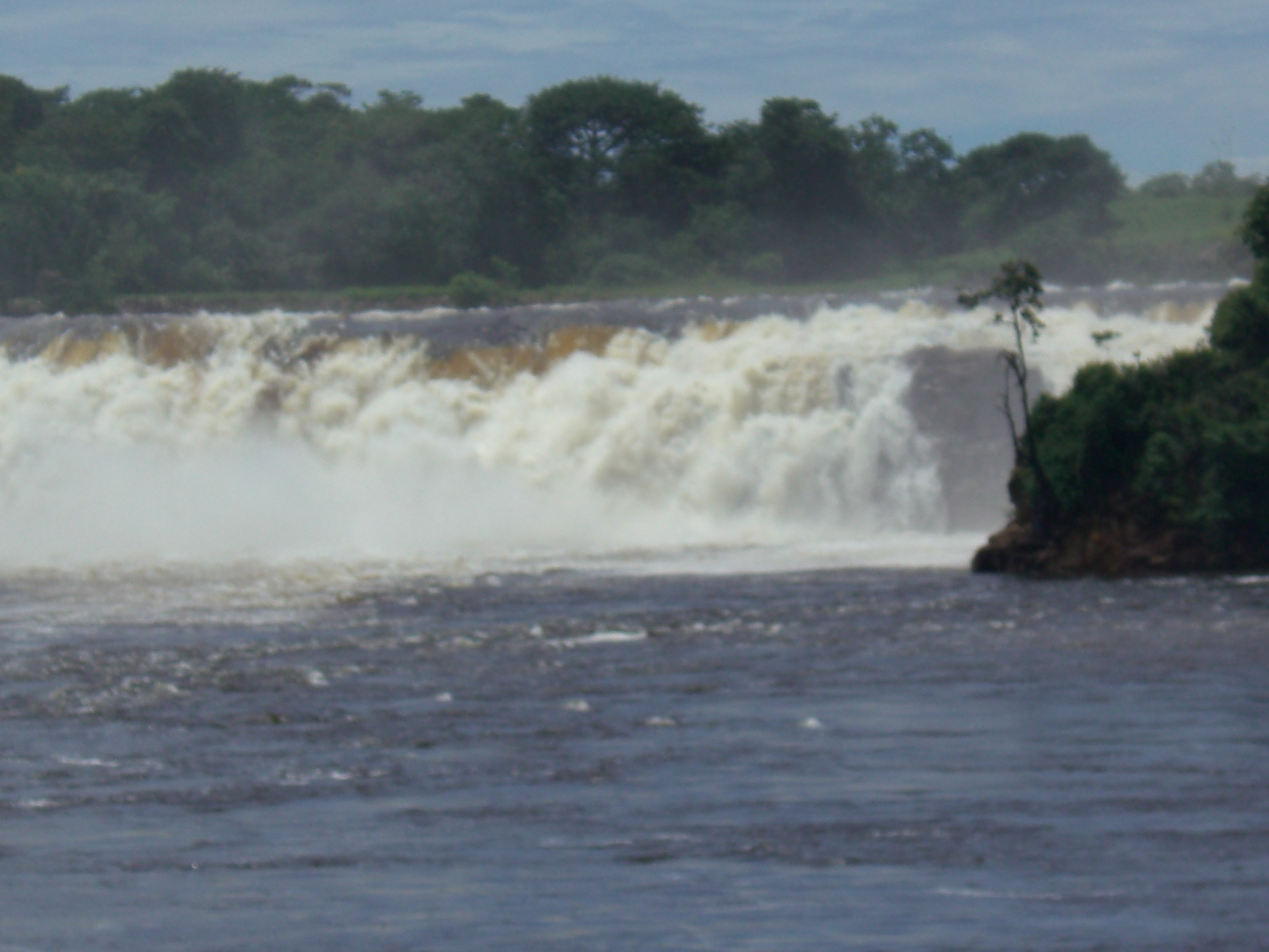 Salto La Lovizna, ícono del parque La Llovizna.